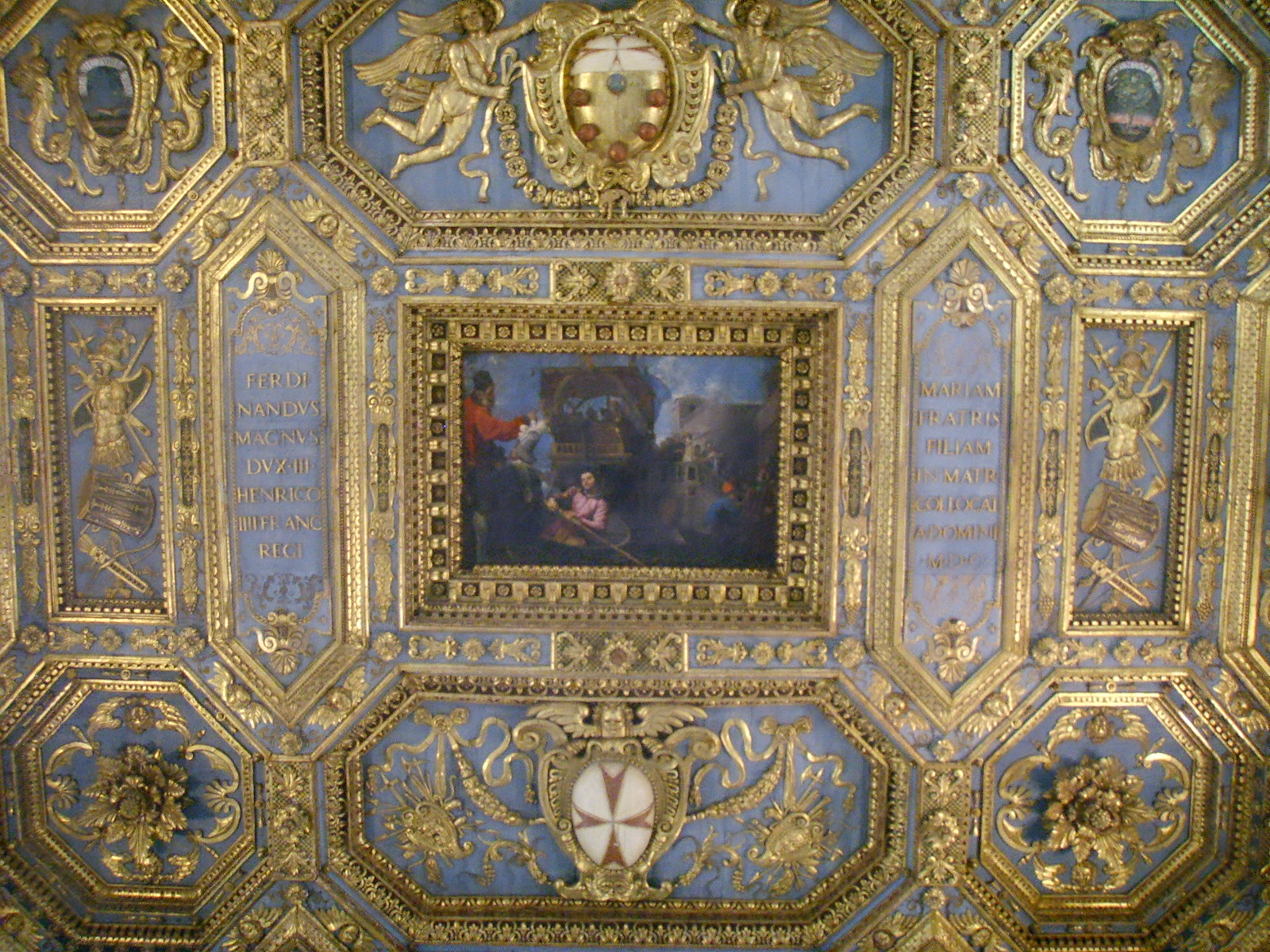 Santo_stefano_dei_cavalieri soffitto_ligneo